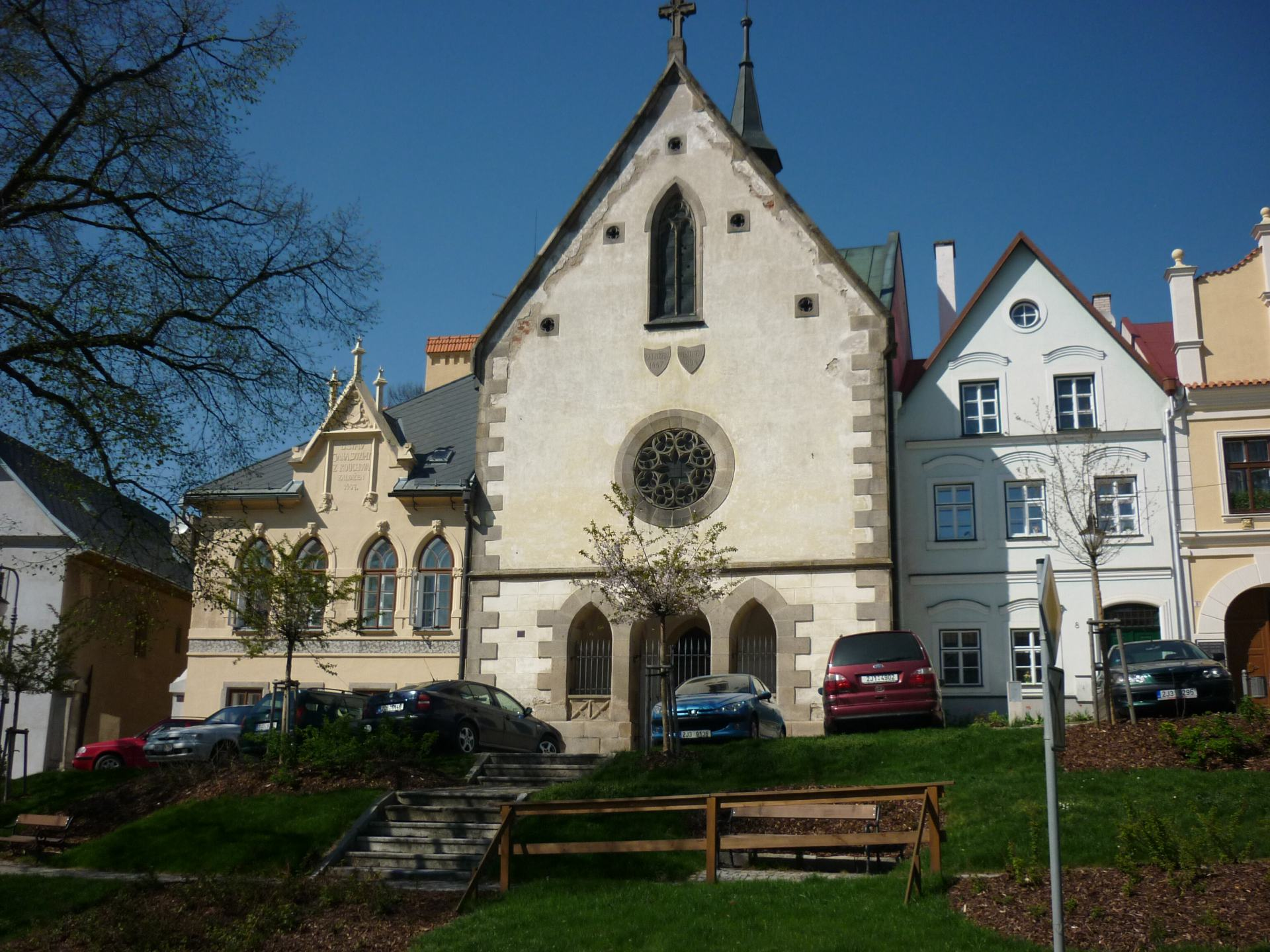 Polná - náměstí a pamětihodnosti